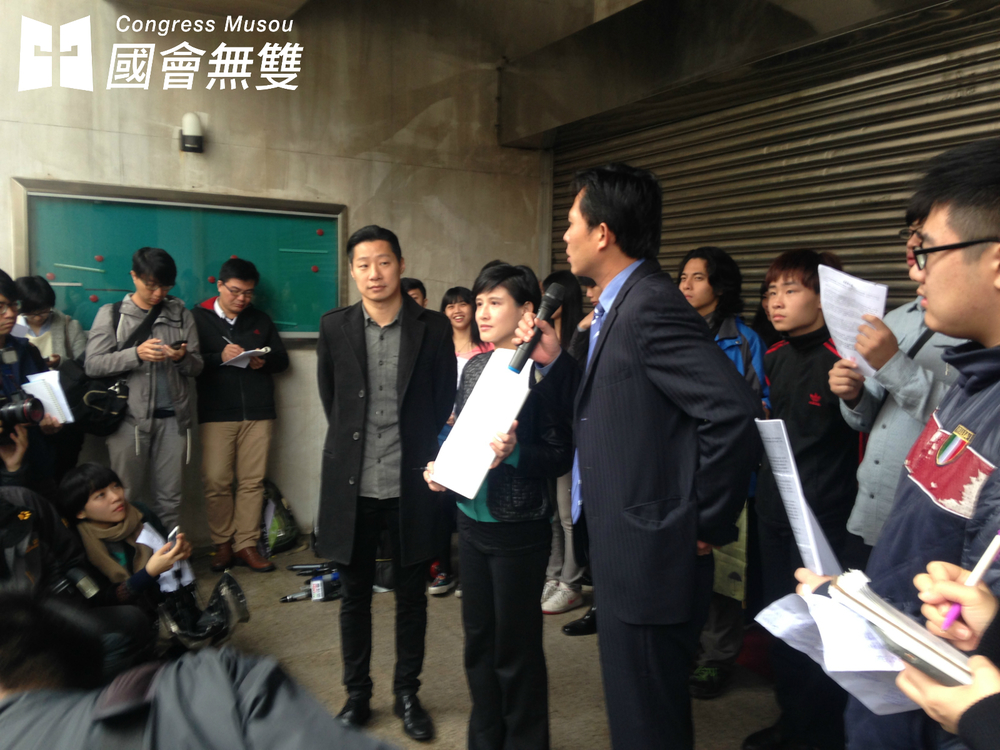 反課綱學生28日集結到立法院群賢樓，呼籲當初連署支持訴求的立委能在新會期夠兌現當初的承諾撤銷微調課綱。